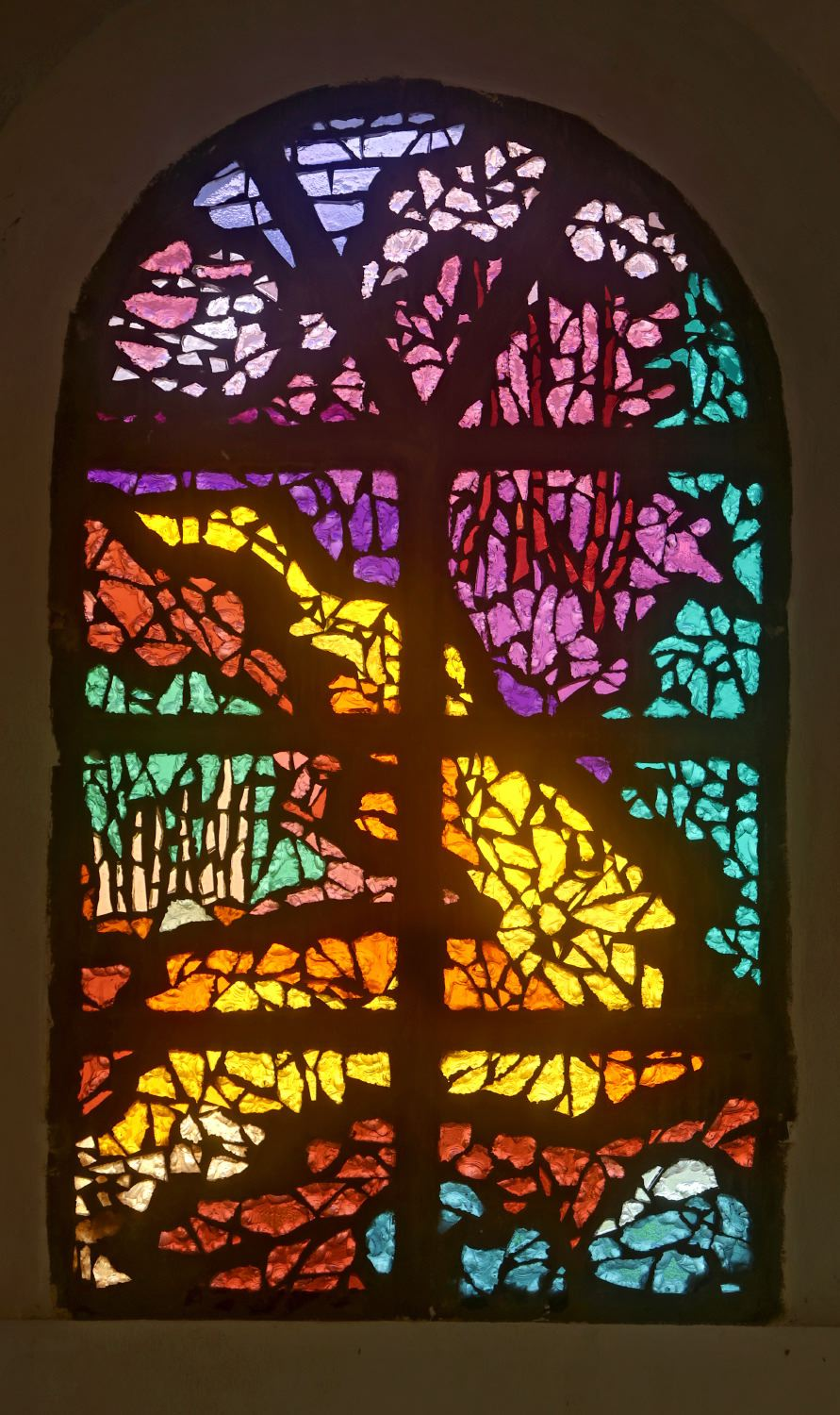 Vitrail de l'église Notre-Dame des Laves à Piton Sainte-Rose (La Réunion) par Guy Lefèvre